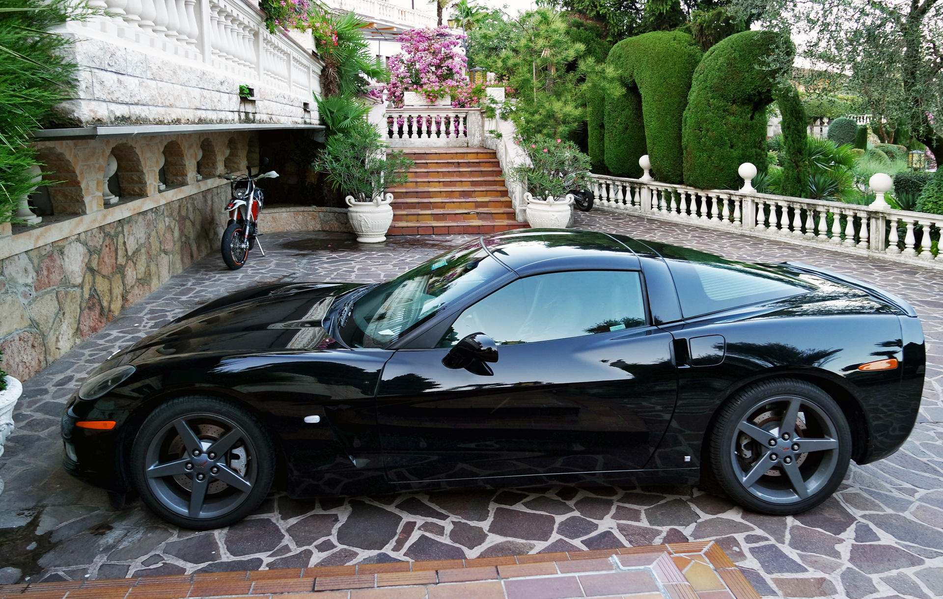 Uno dei 250 esemplari di Corvette C6 Victory Edition